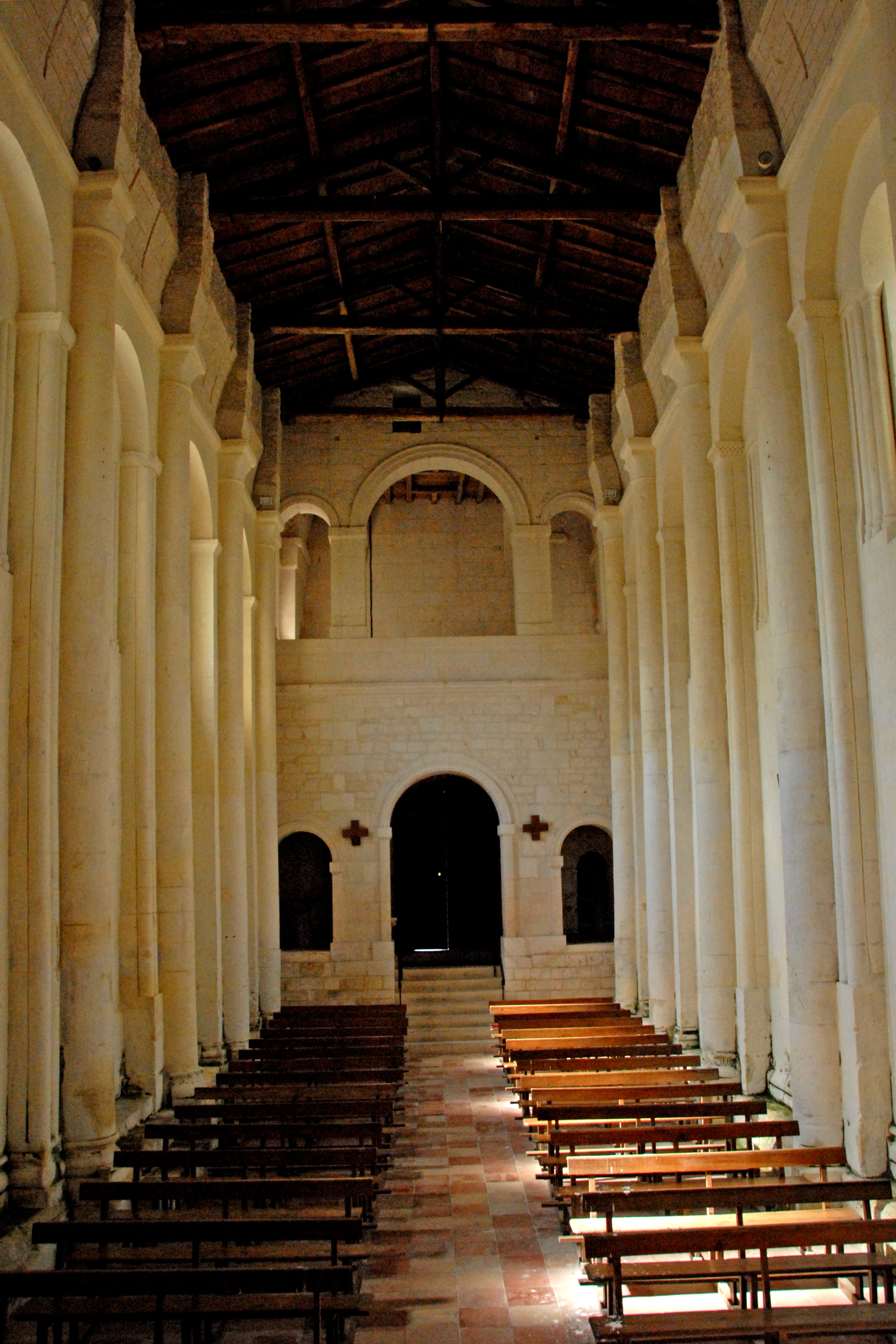 Chadenac, Schiff, nach hinten gesehen